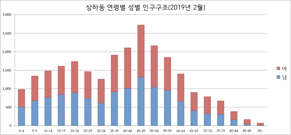 용인시 상하동 성별 연령별 인구구조